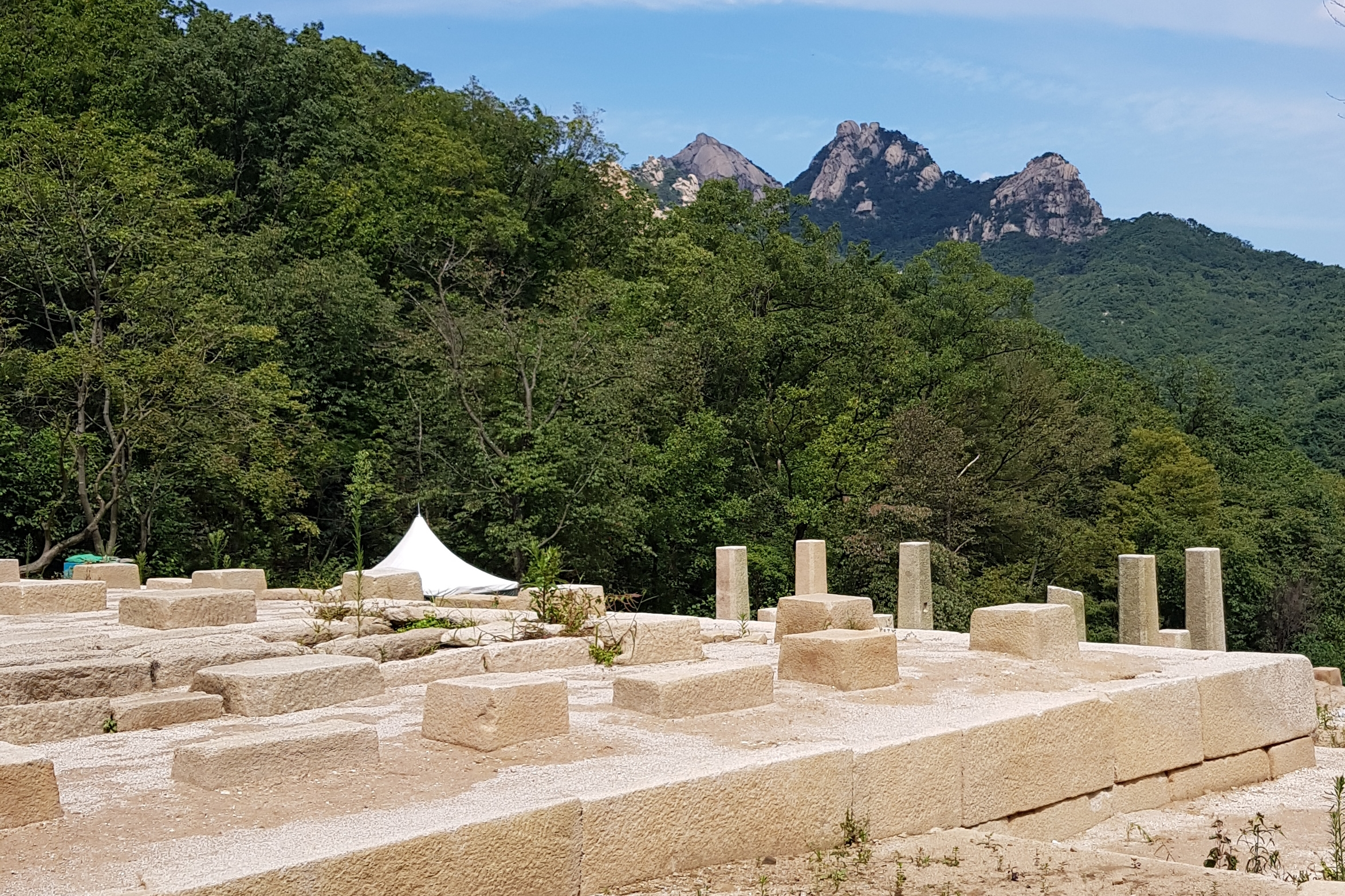 북한산성 행궁지